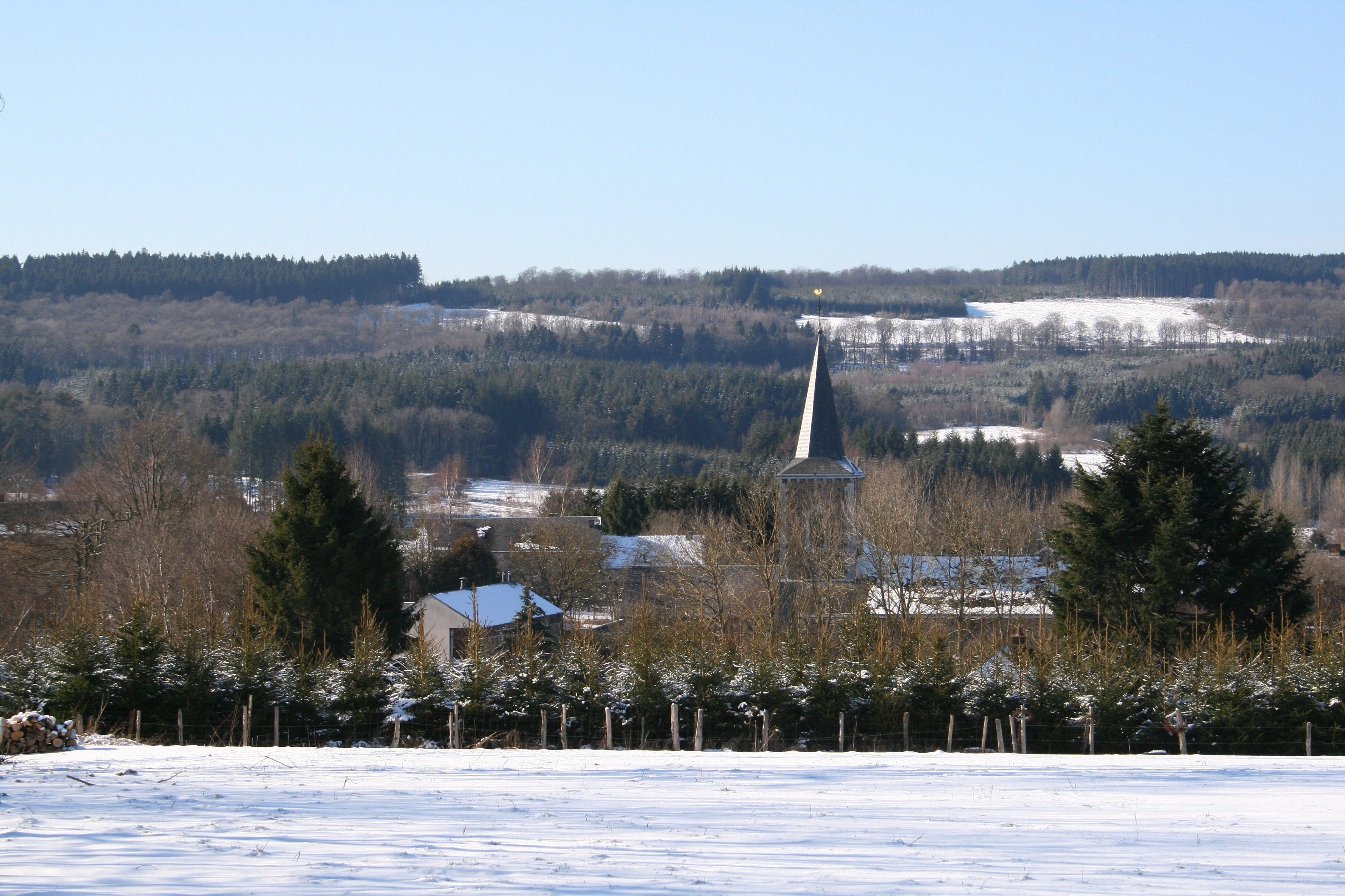 Journal (Tenneville) (Belgique), le village vu depuis une prairie longeant la rue Trompe-Souris.